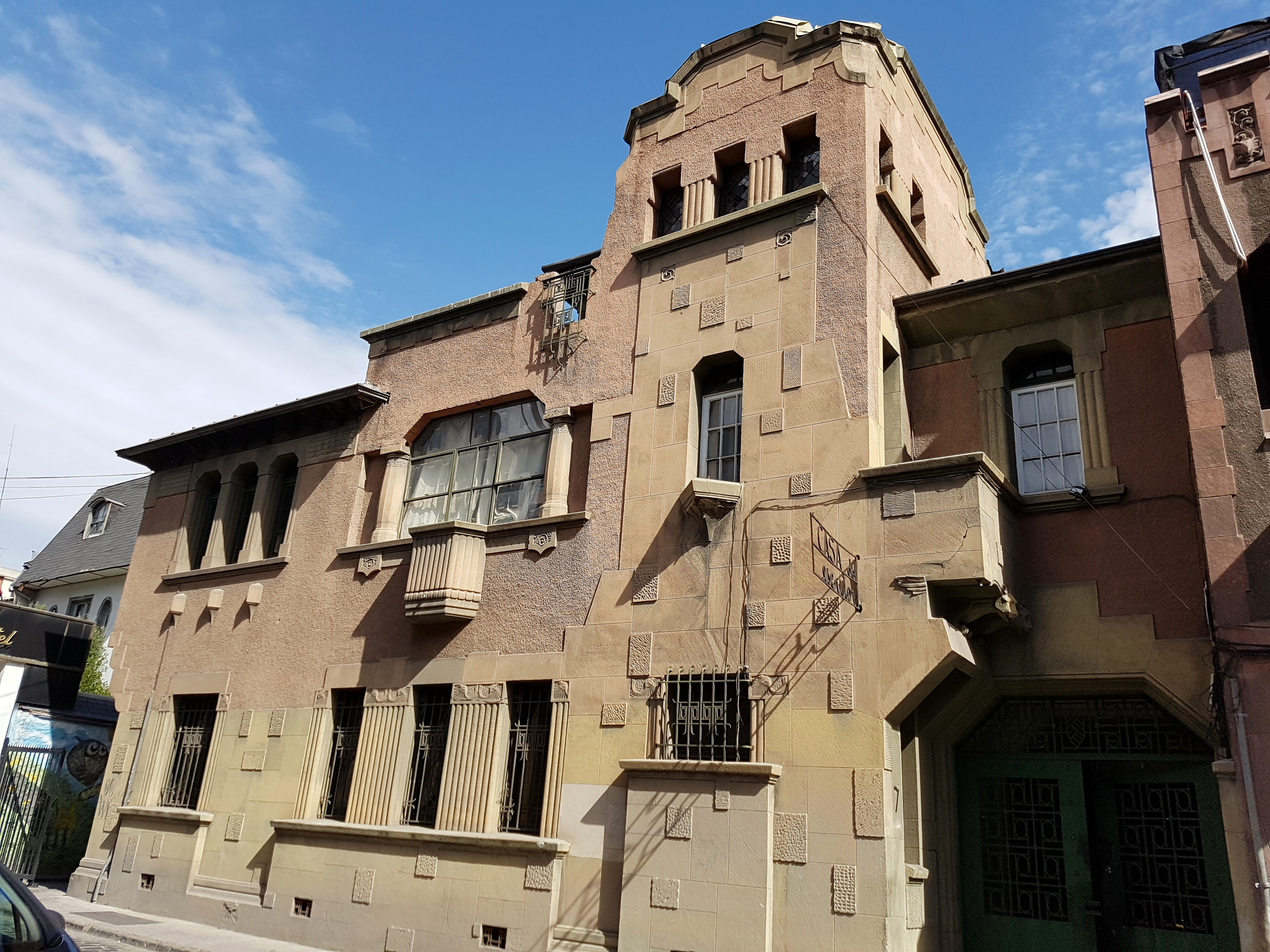 La Casa del Escritor, sede de la Sociedad de Escritores de Chile (SECH); declarada Monumento Histórico en 2009. Está ubicada en Almirante Simpson 7, comuna de Providencia, Santiago de Chile.